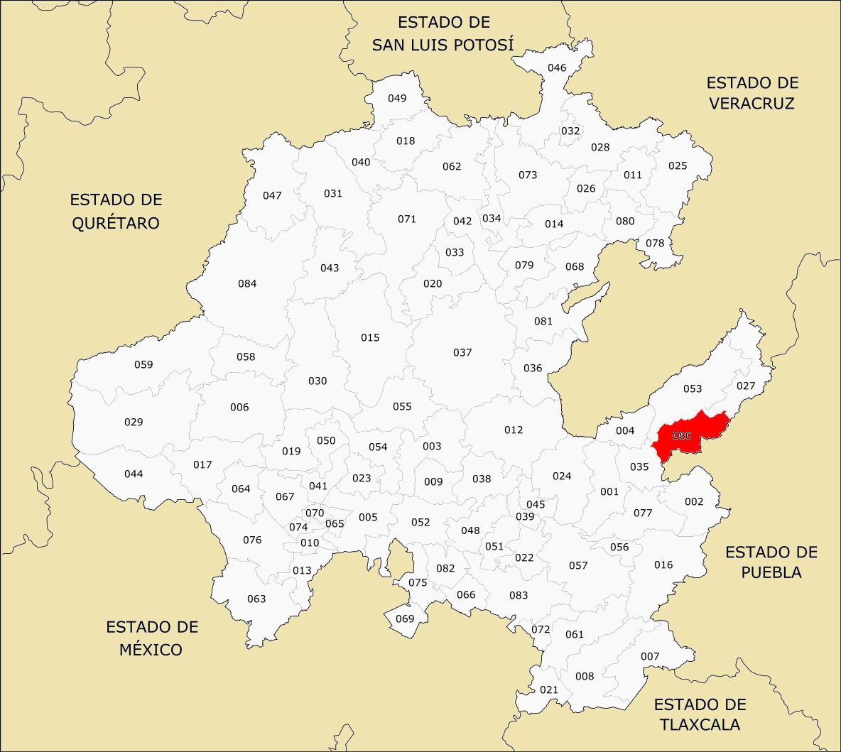 Municipio de Hidalgo